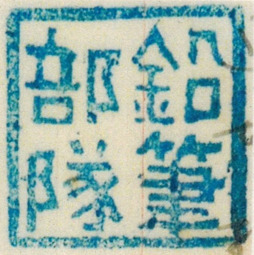 鉛筆部隊隊長だった柳内達雄の手作りの判子